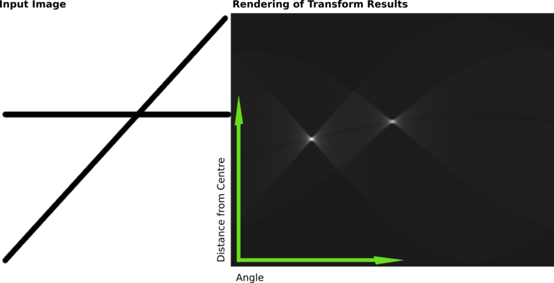 example hough